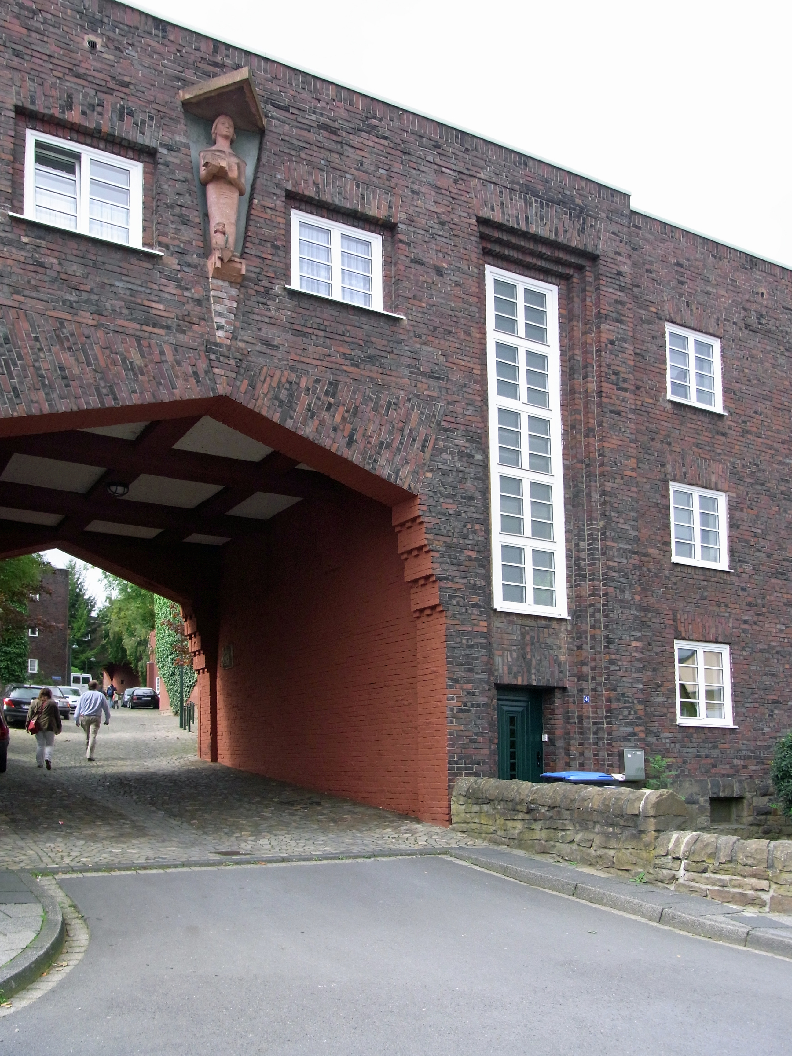 Tag des offenen Denkmals 2010: Hagen Cunosiedlung mit Skulptur von Karel Niestrath